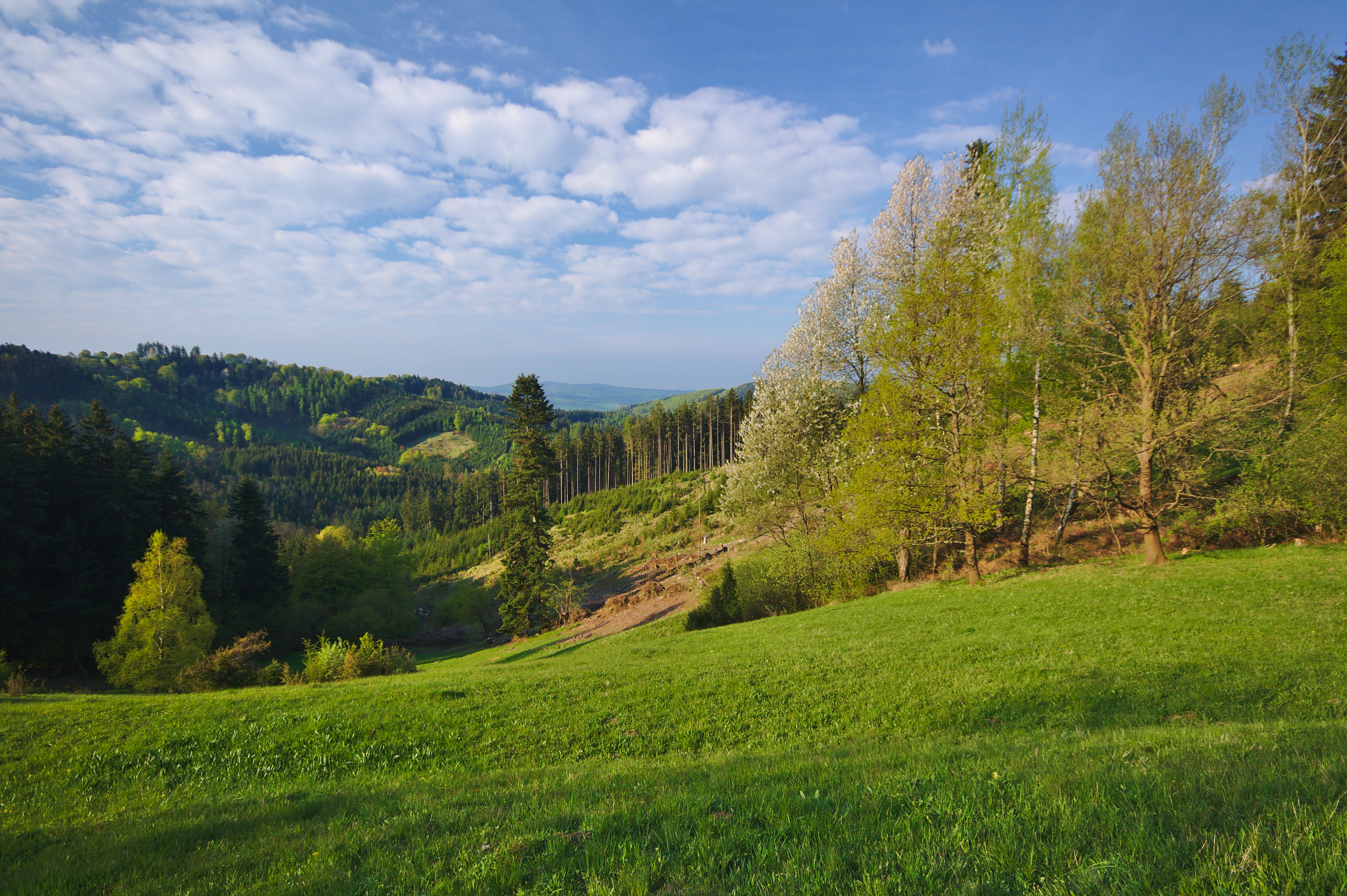 Přírodní památka Dobšena, okres Zlín